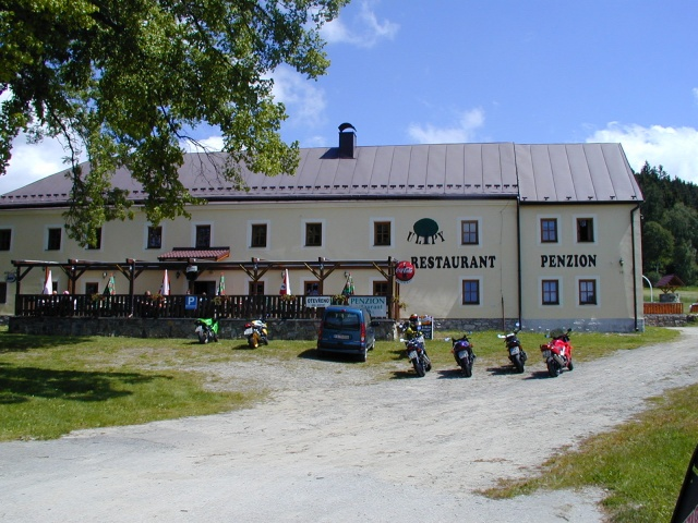 Penzion U Lípy, Hůrka 19, 382 26 Horní Planá. Pohled od hlavní silnice, příjezdová cesta k penzionu.